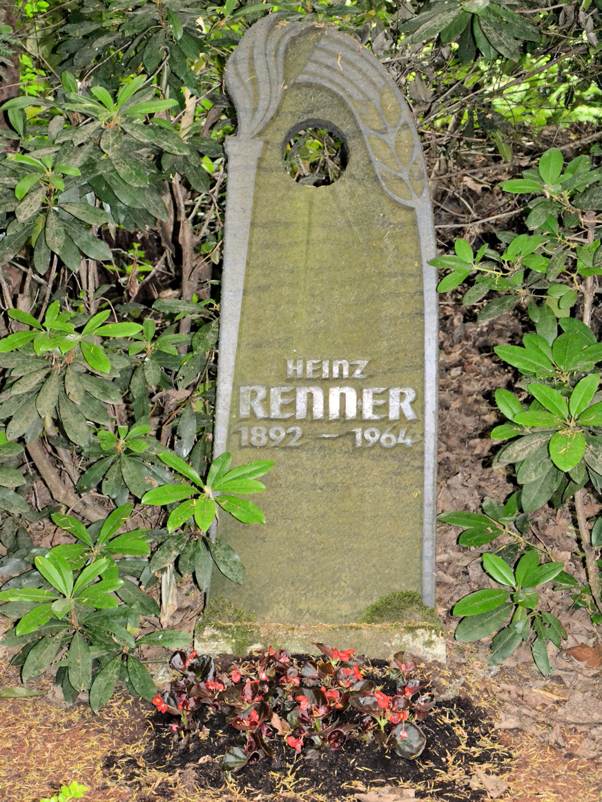 Heinz Renners (Oberbürgermeister der Stadt Essen) "Ehrengrab der Stadt Essen" auf dem Essener Südwestfriedhof